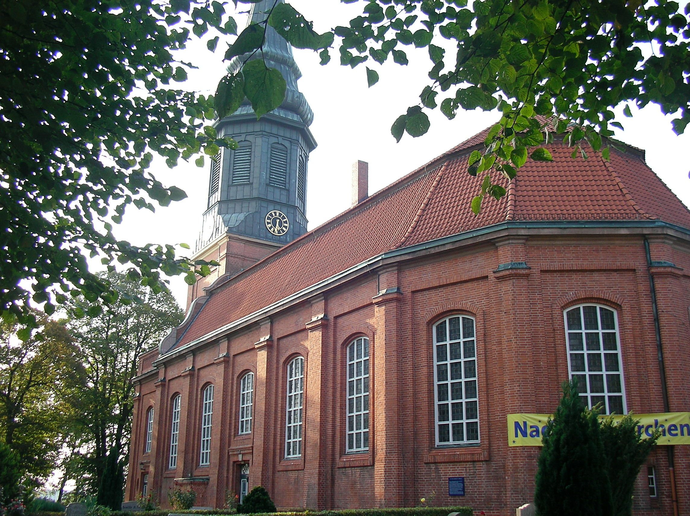 Hamburg-Billwerder